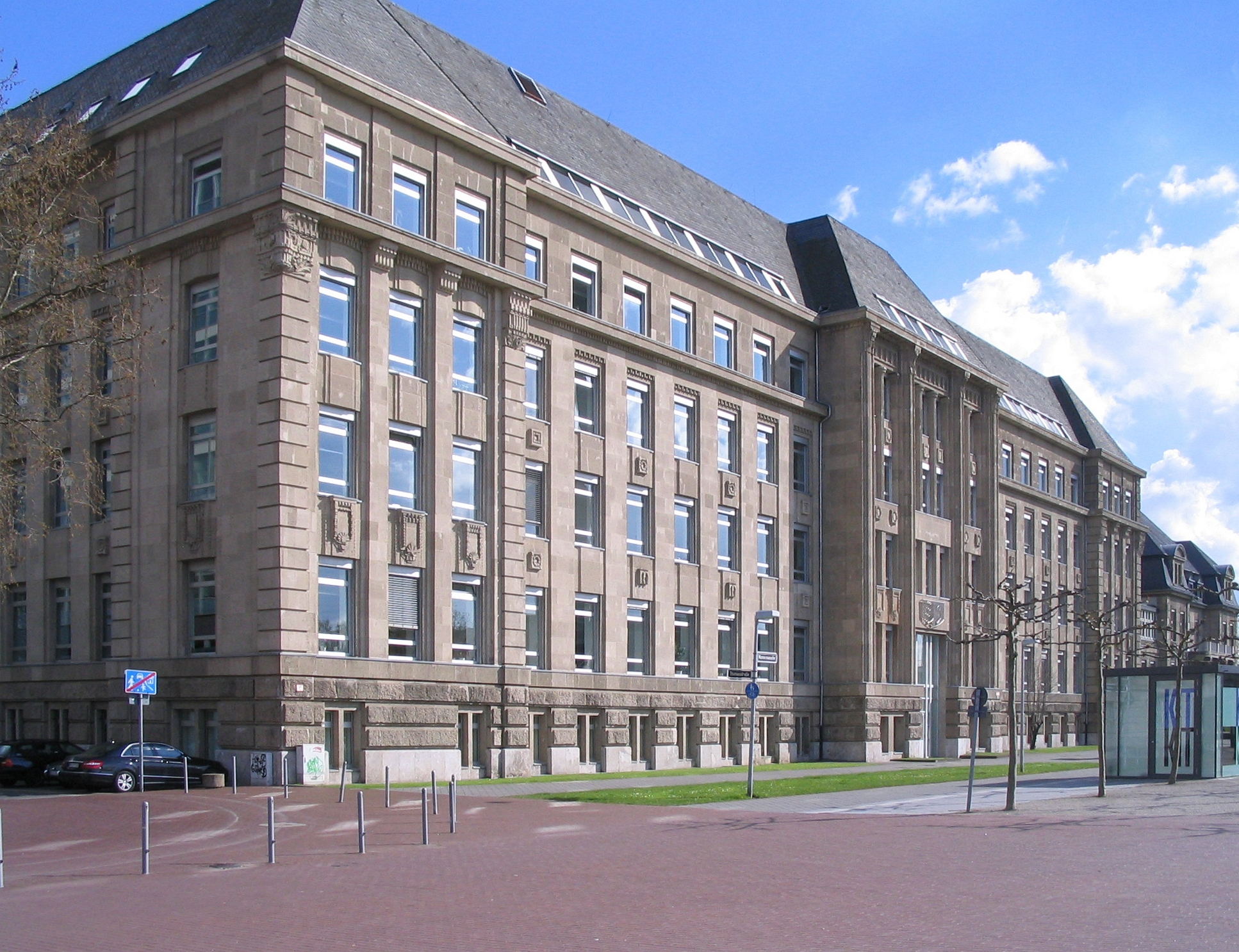 Düsseldorf, Mannesmannufer 1 a. Denkmalgeschütztes Bauwerk.